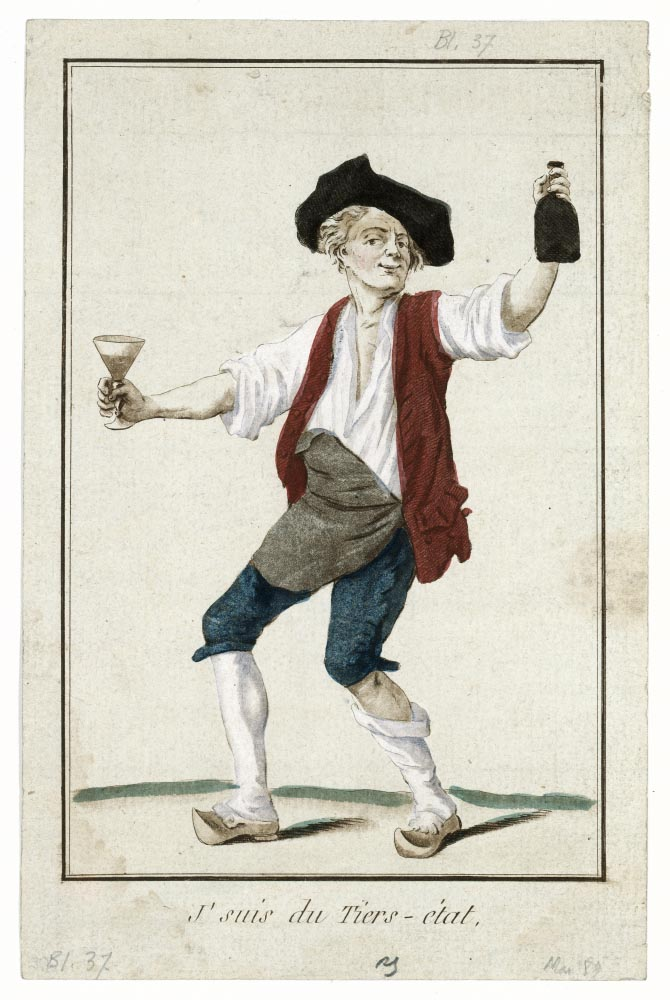 "J'suis du Tiers-état." Eau-forte coloriée, anonyme, sans date.